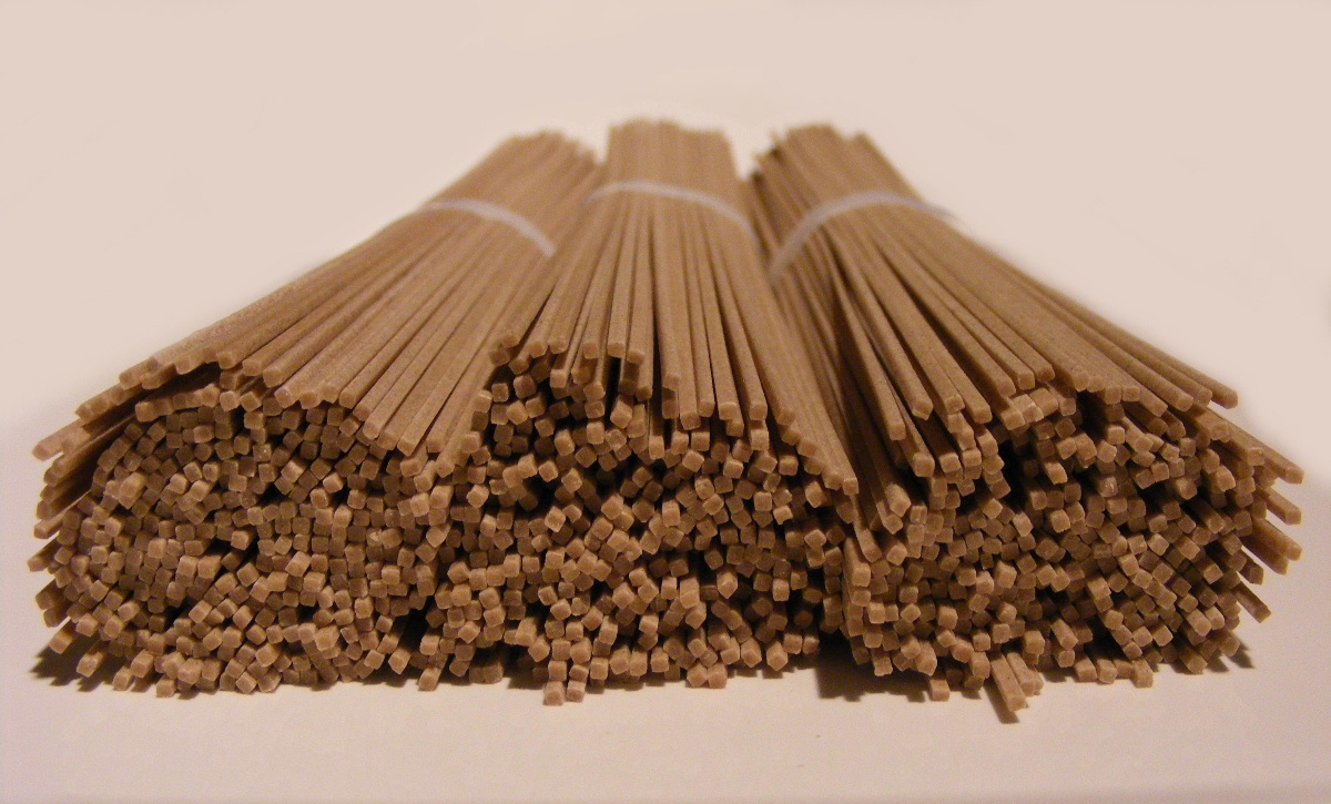 蕎麦乾麺（熊本県下益城郡城南町坂野94、五木食品[1]の乾麺）